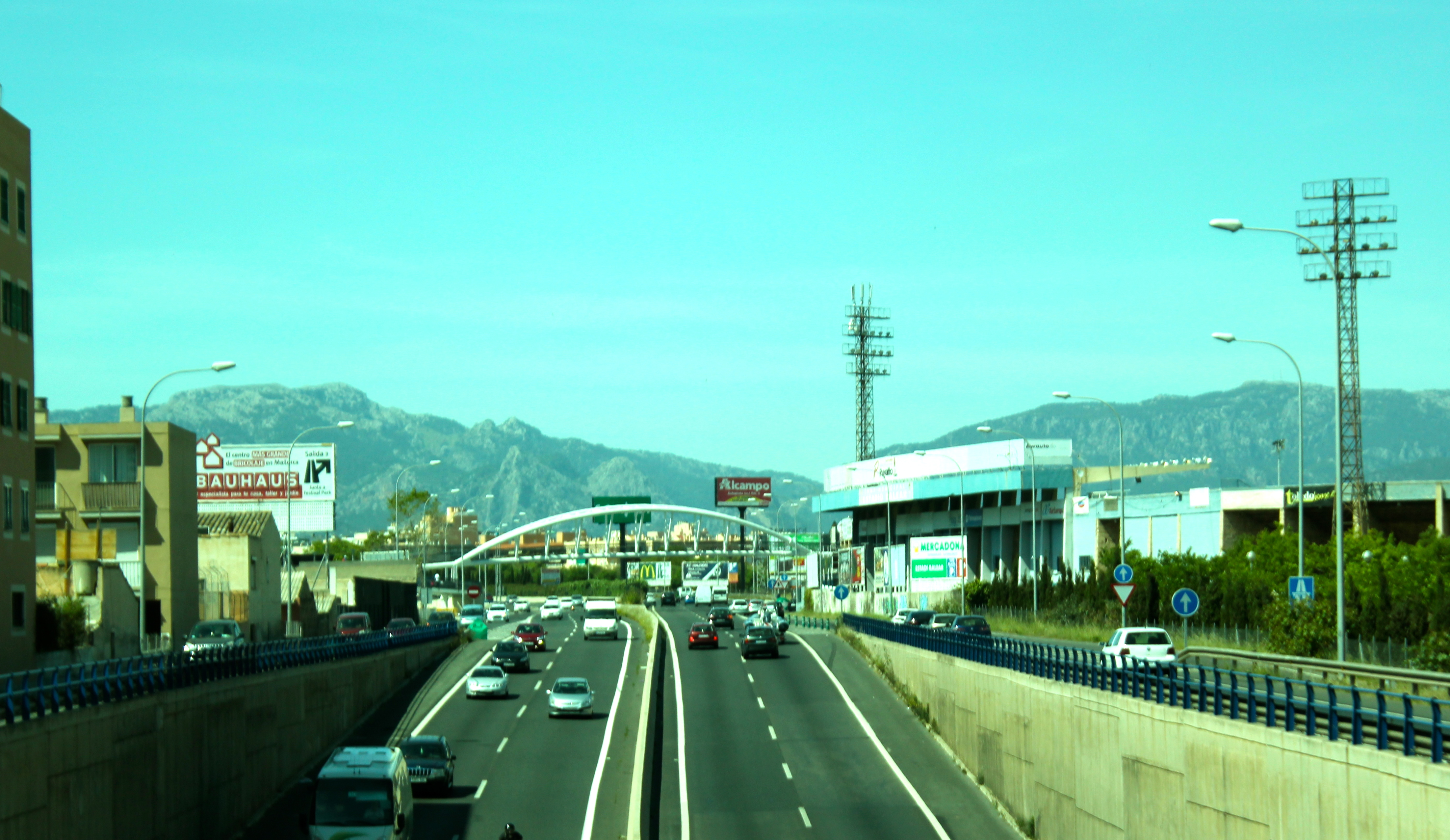 Pont peatonal nou sobre la via de cintura